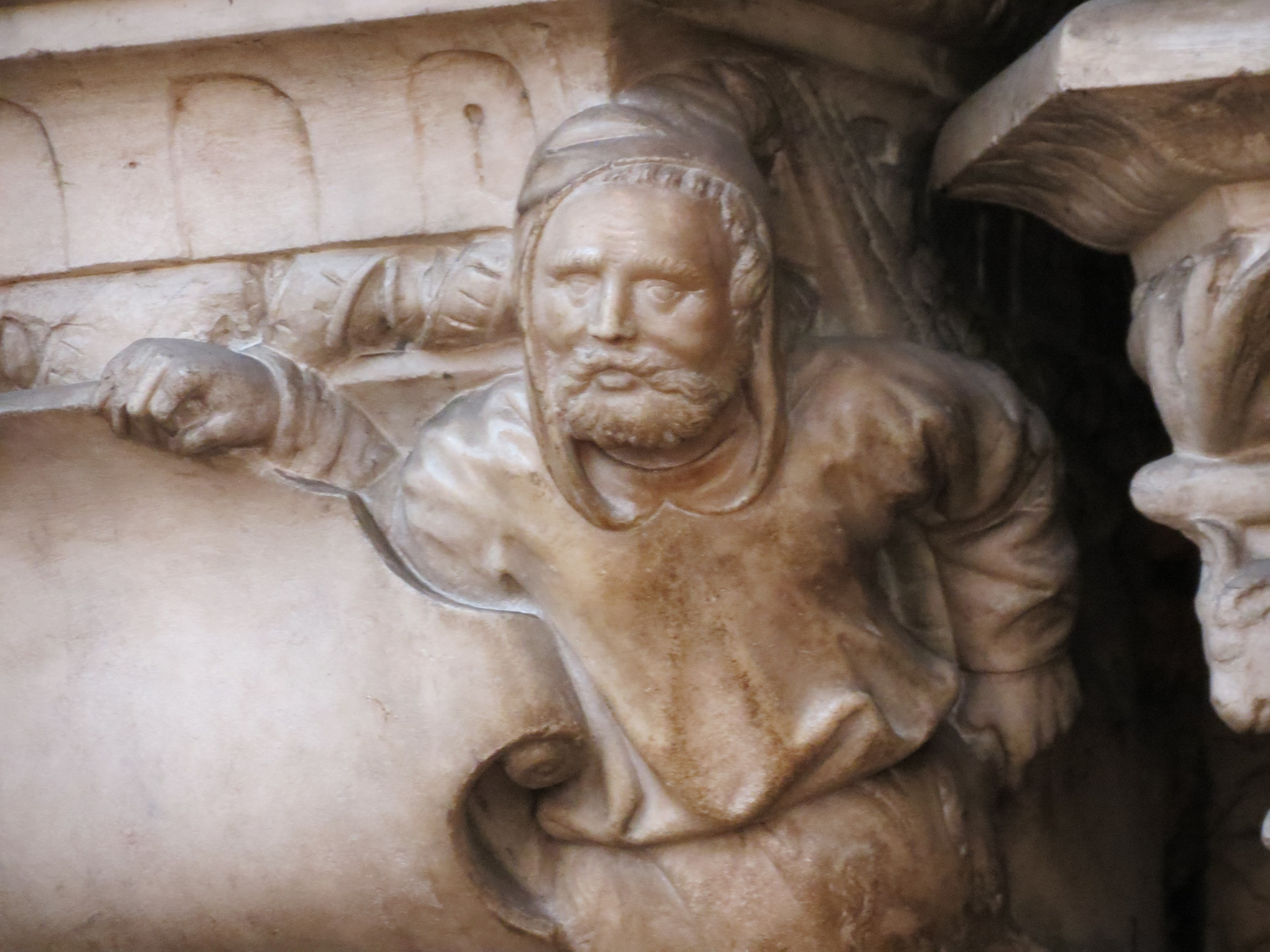 Roulland Le Roux lui-même, représenté sur le mausolée des cardinaux d'Amboise.